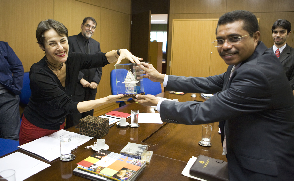 Reunião da ministra da Cultura do Brasil, Ana de Hollanda, com Sr. João Câncio Freitas, ministro de Estado da Educação e Cultura do Timor-Leste